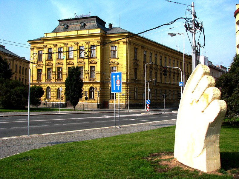 budova FF UHK